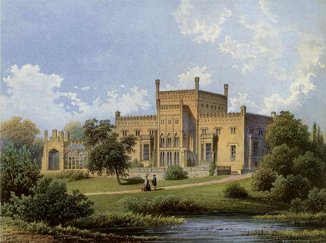 Schloss Jarocin, Kreis Pleschen, Provinz Posen, Lithografie aus dem 19. Jahrhundert